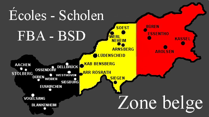 Écoles des FBA